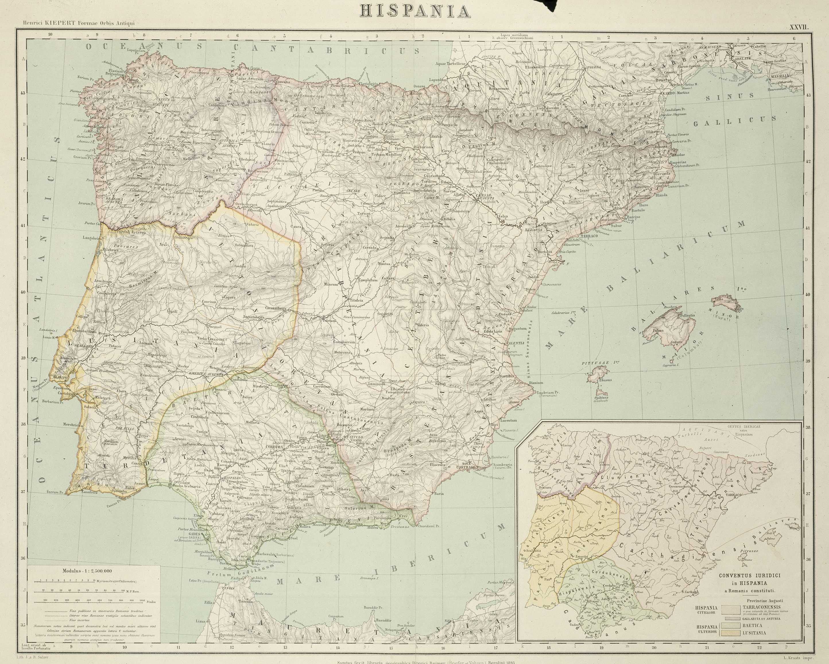 Formae Orbis Antiqui XXVII. Hispania